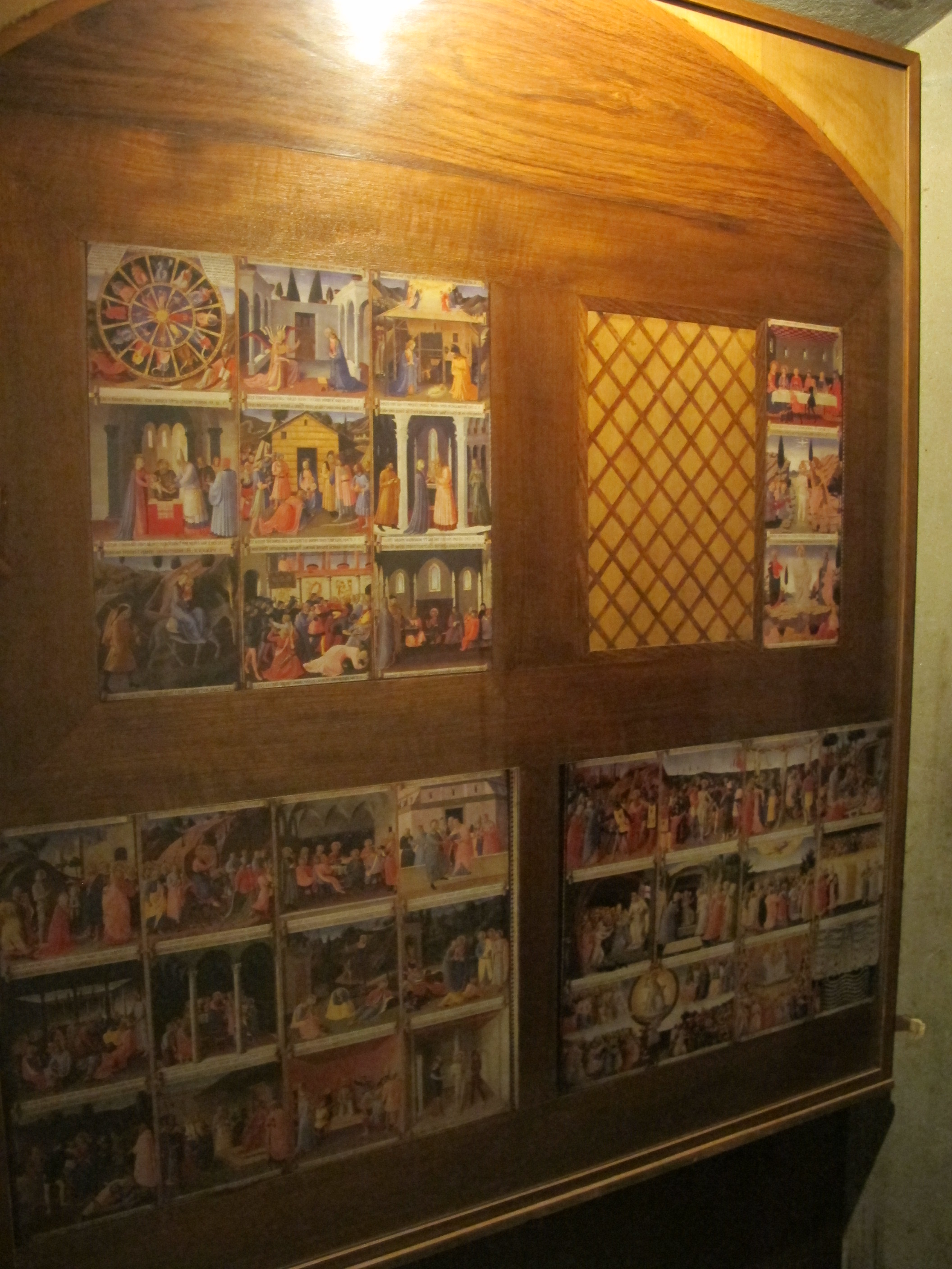 Santissima annunziata, cappella degli ex-voto, luogo armadio degli argenti dell'angelico